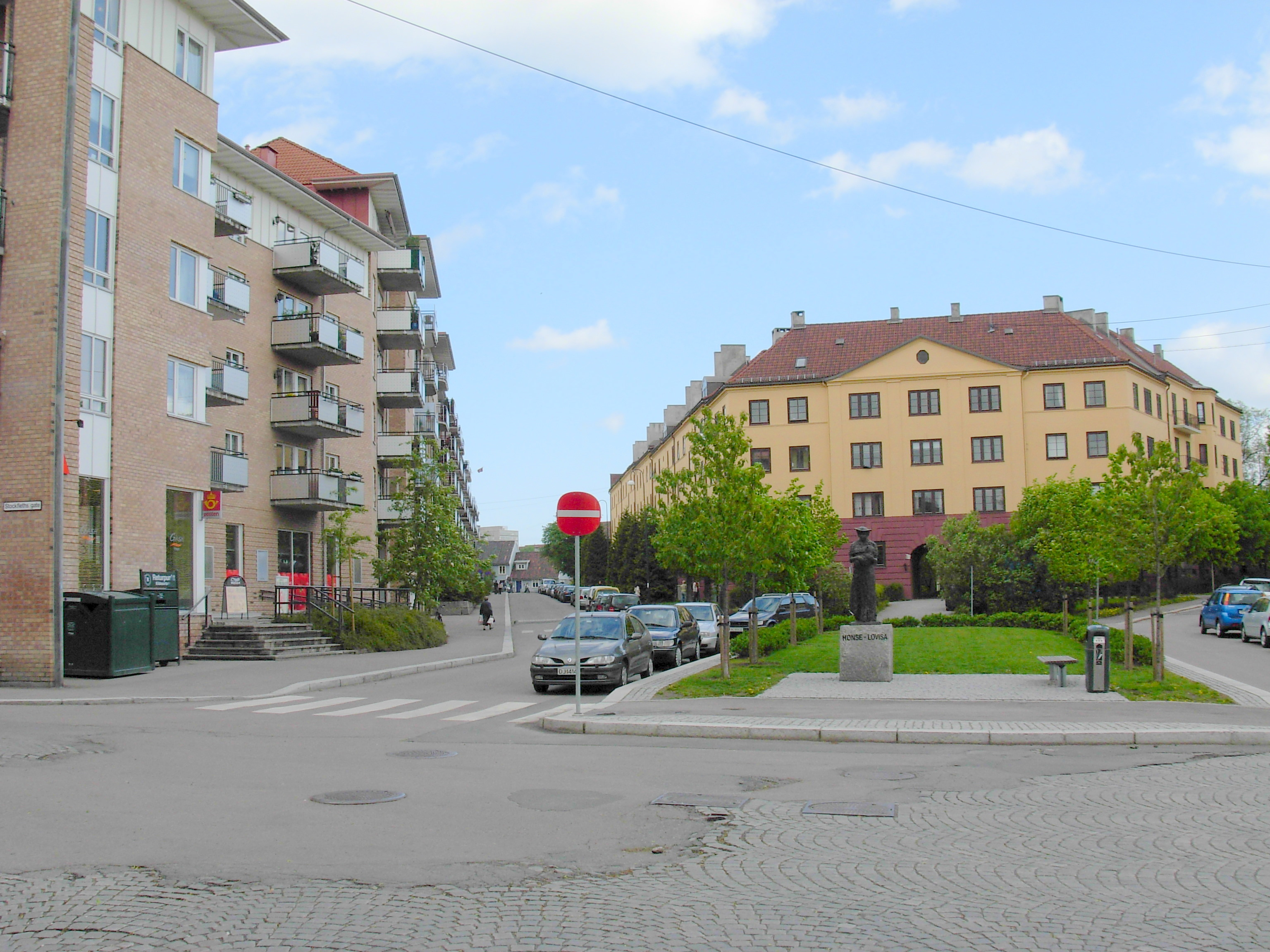 Thurmanns gate, sett mot øst fra Stochfleths gate